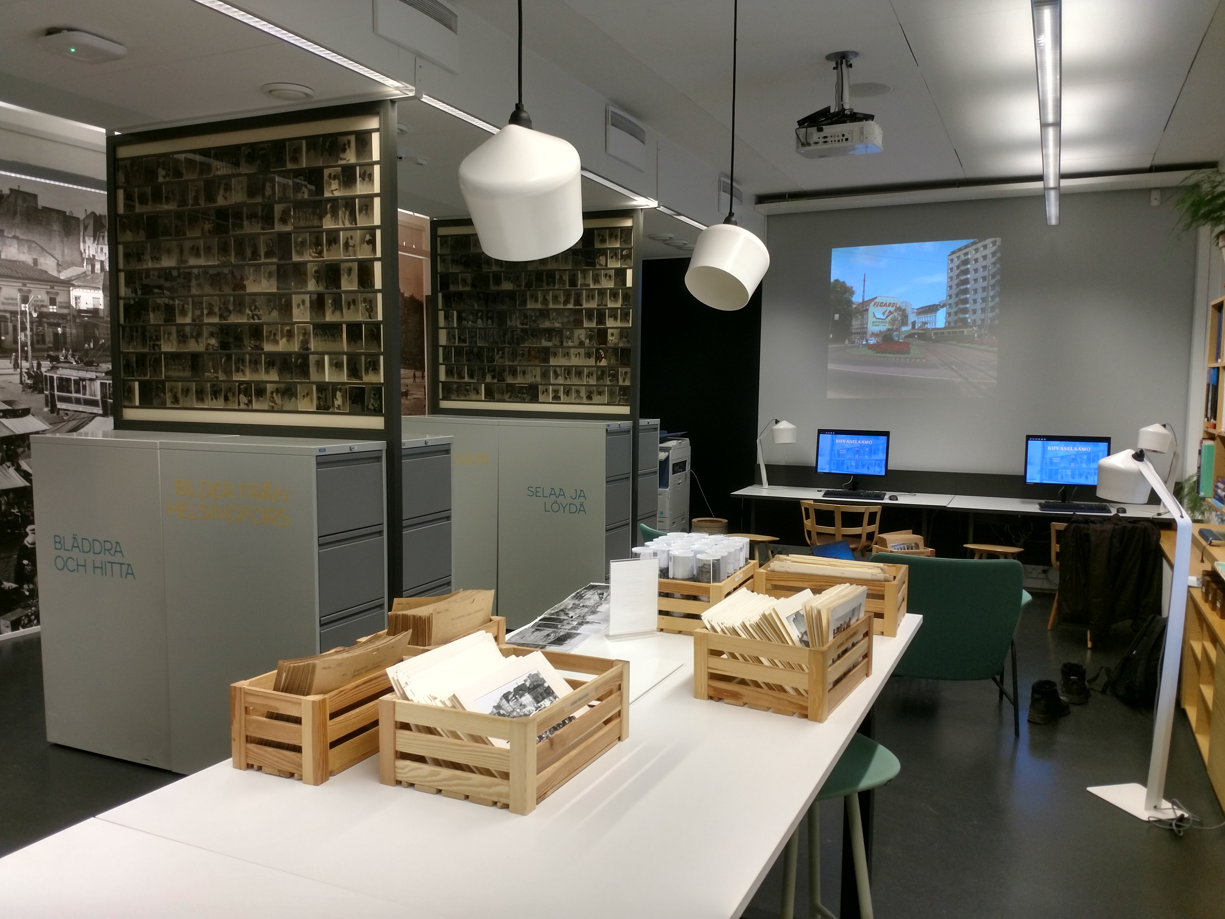 Helsingin kaupunginmuseon kuvaselaamo